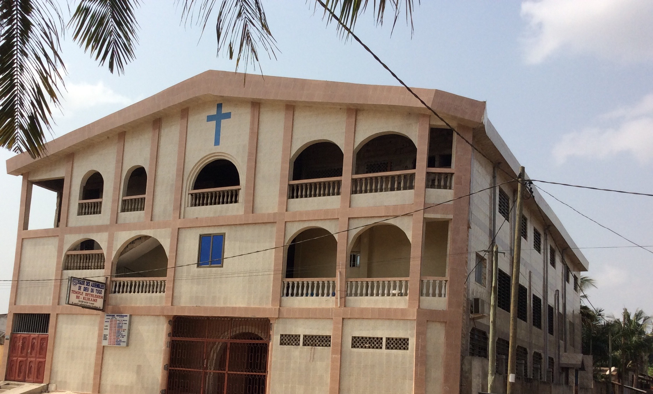 Église des Assemblées de Dieu - Temple Bethlehem Bè-Klikamé, Lomé, Togo